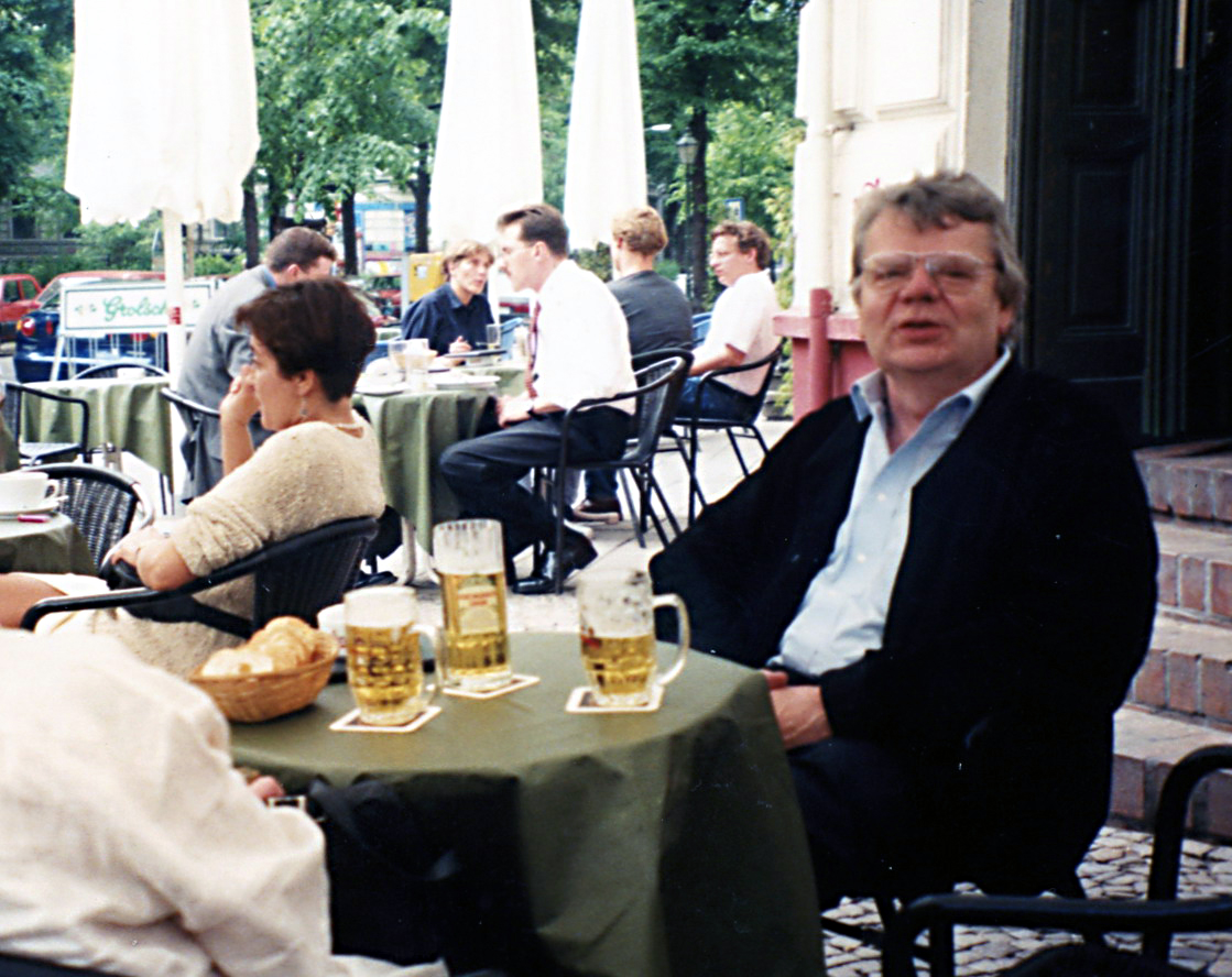 Rainer Malkowski im Mai 1997 während eines Besuchs seiner Heimatstadt Berlin am Kollwitzplatz, um einen Eindruck vom ehemaligen "Ost-Berlin" nach der Fall der Mauer zu bekommen.